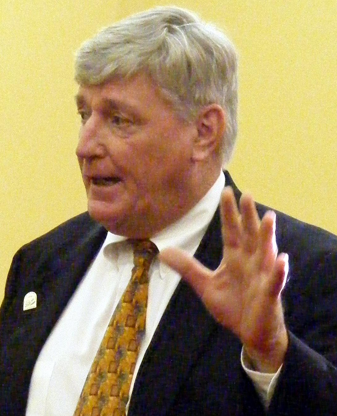 Michael E. Busch.